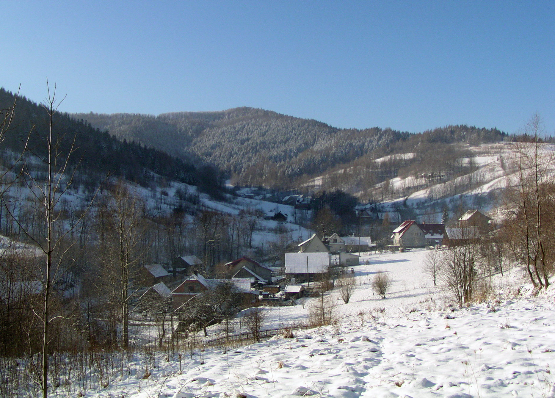 Gancarz- zimowy widok od strony miejscowości Ponikiew